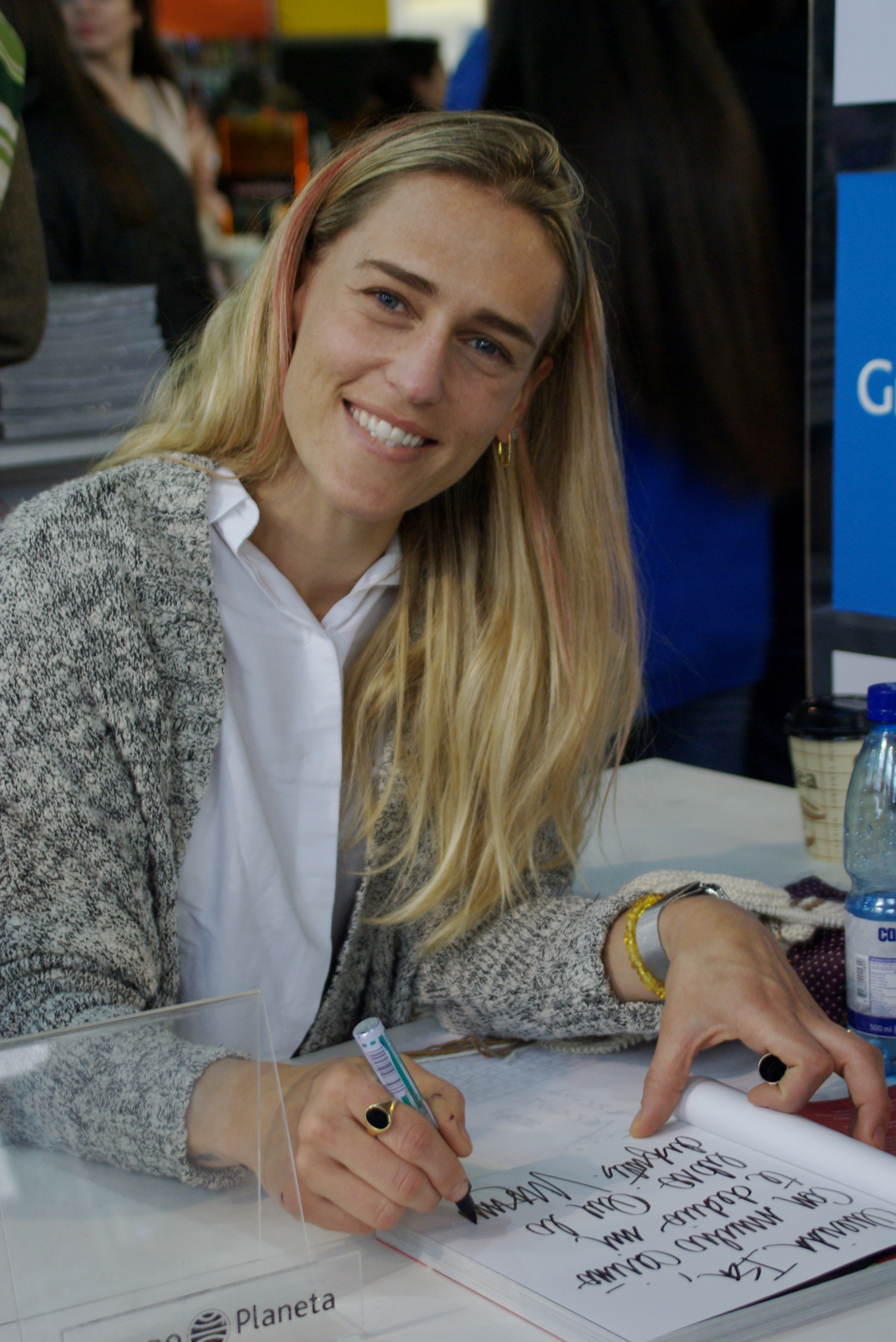 La chef chilena Virginia Demaria en la Feria Internacional del Libro de Santiago 2015